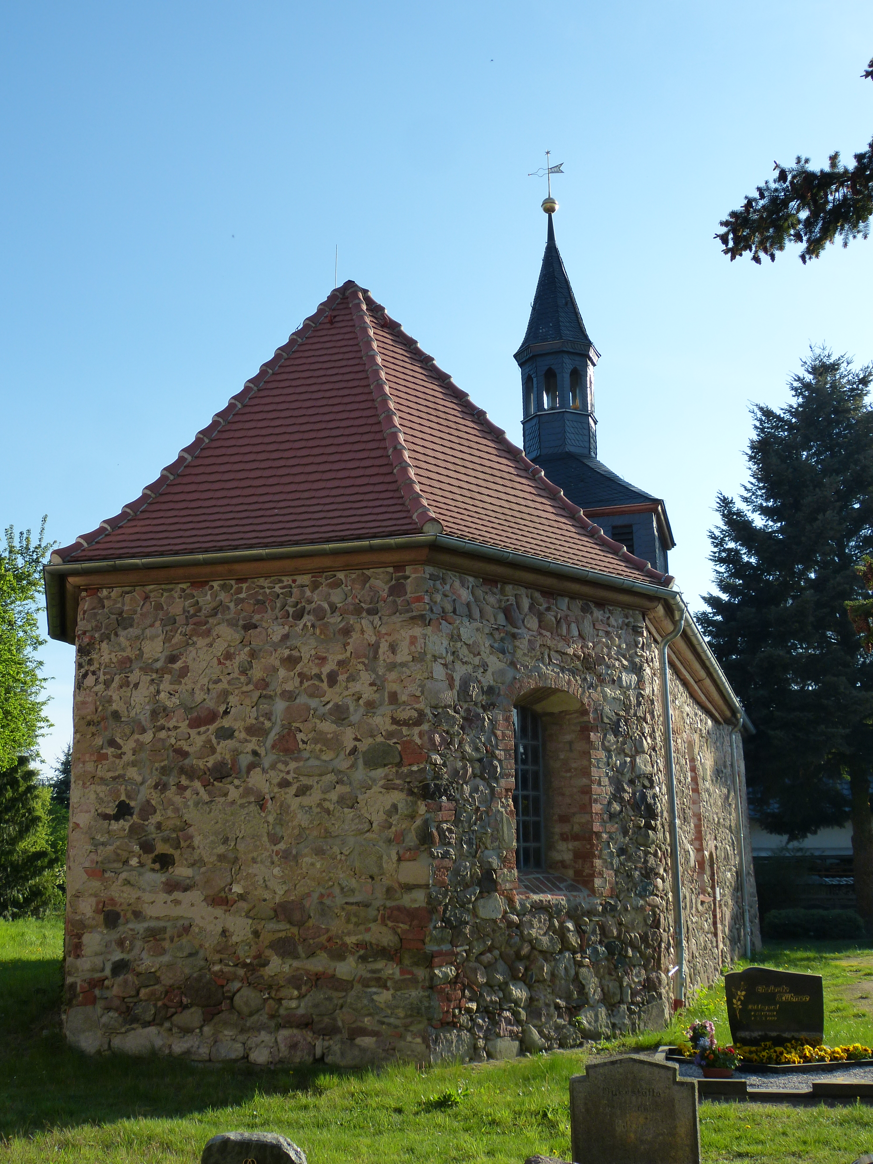 Hohenlubast (Ortsteil von Schköna), Feldsteinkirche aus dem 13. Jh. , Sicht vom Parkplatz